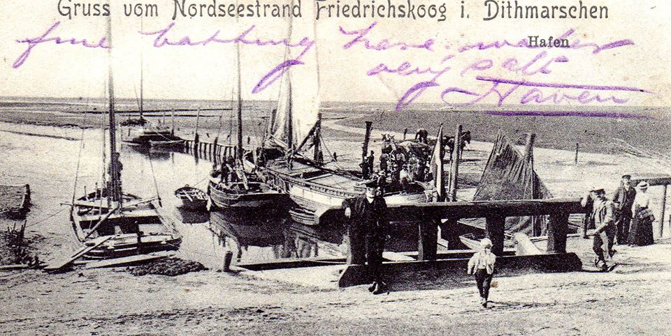 Bei der Eindeichung des Friedrichskoogs in den 1853/1854 wurde unter Ausnutzung des bestehenden Priels Rugenorter Loch ein Sielhafen angelegt, der im Jahr 1855 seinen Betrieb aufnahm. Hier legten zunächst überwiegend Frachtsegler an, die landwirtschaftliche Erzeugnisse der Köge in die Städte (insbesondere Hamburg) brachten. Im Vordergrund ist der zur Entwässerung des Koogs dienende Deichdurchlass, das Siel, zu erkennen.